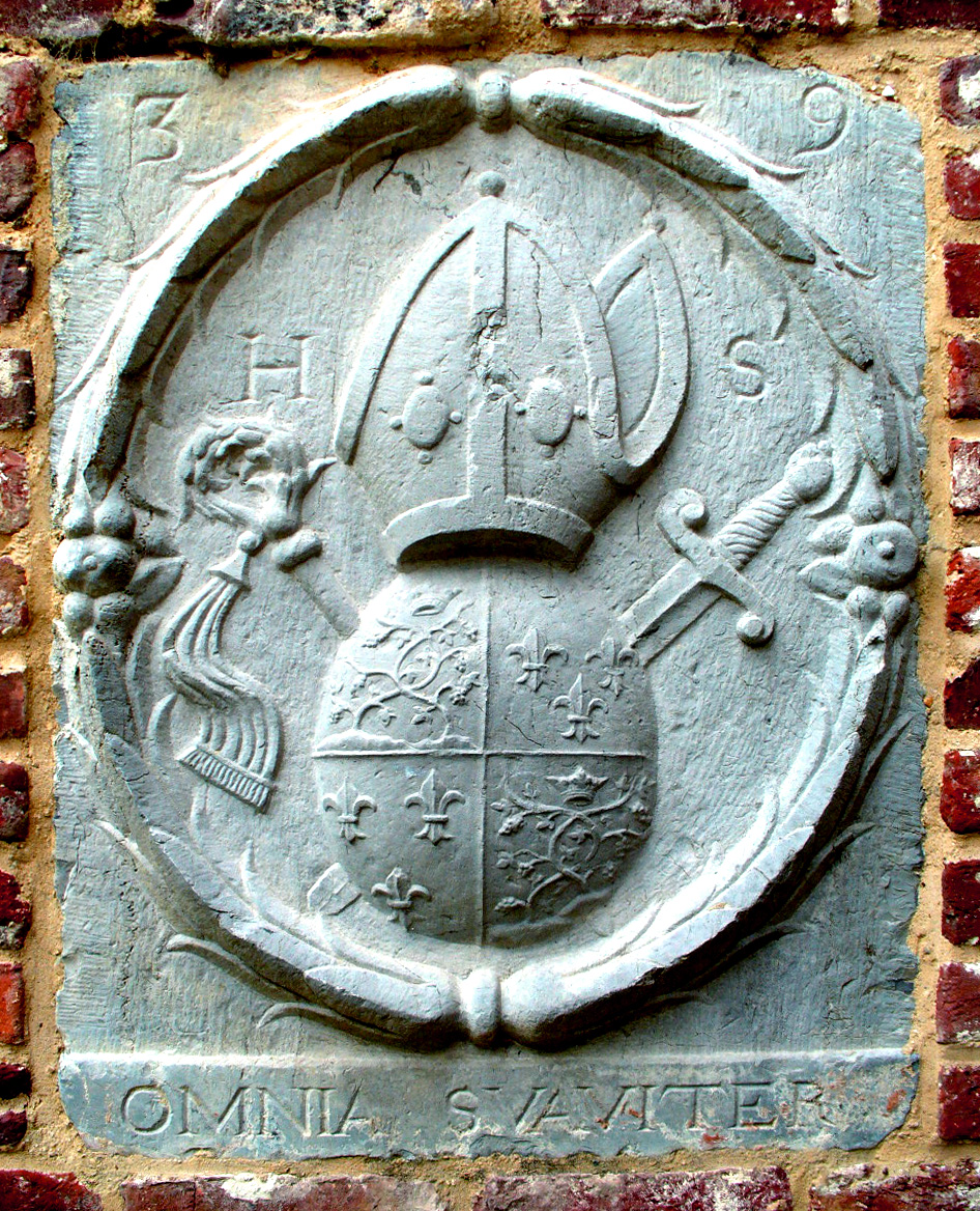 Ingemetselde steen met wapenschild van abt Hubert van Sutendael en jaartal 1639 in het kateelcomplex van Nieuwenhoven (Sint-Truiden)